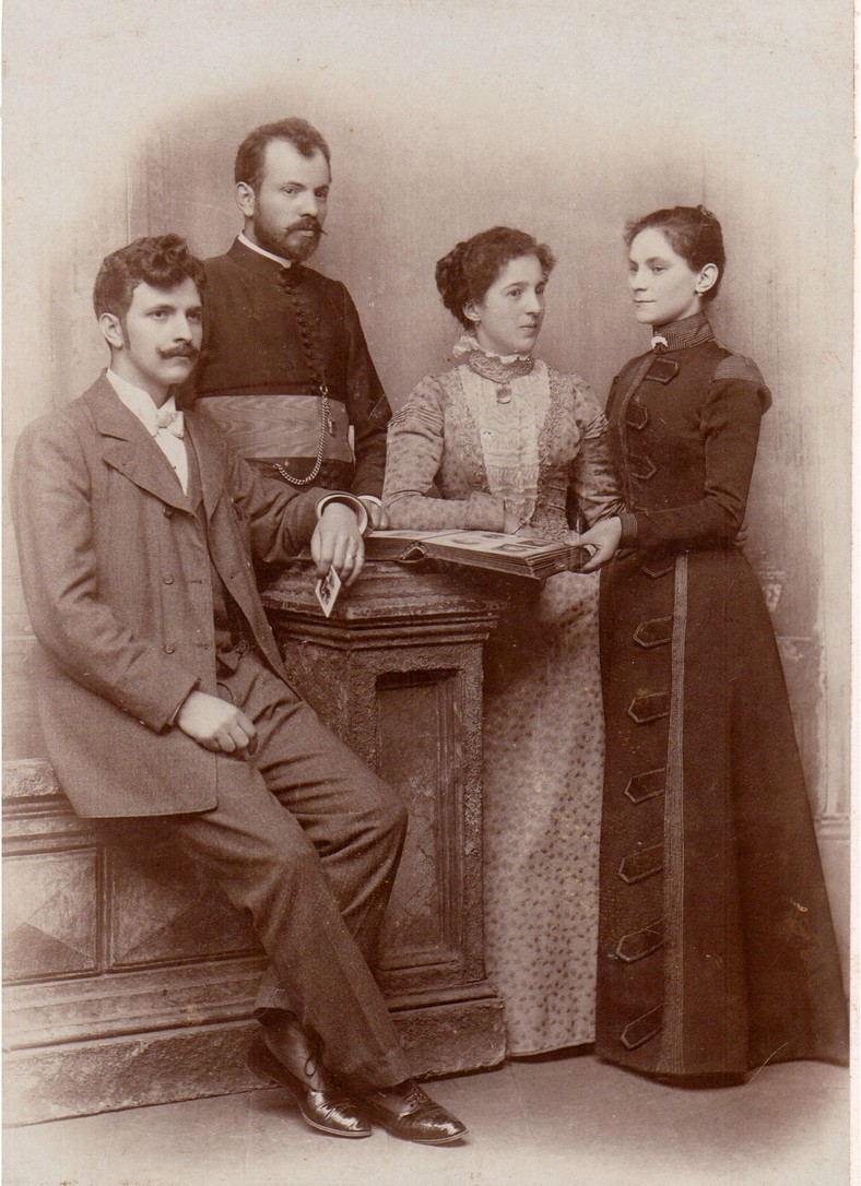 Iosif Velceanu stânga, Alexandru Munteanu in mijloc, Elena Munteanu, dreapta Aurelia Velceanu, februarie 1900